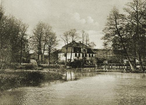 Dolina Schwabego, Gdańsk-Oliwa.